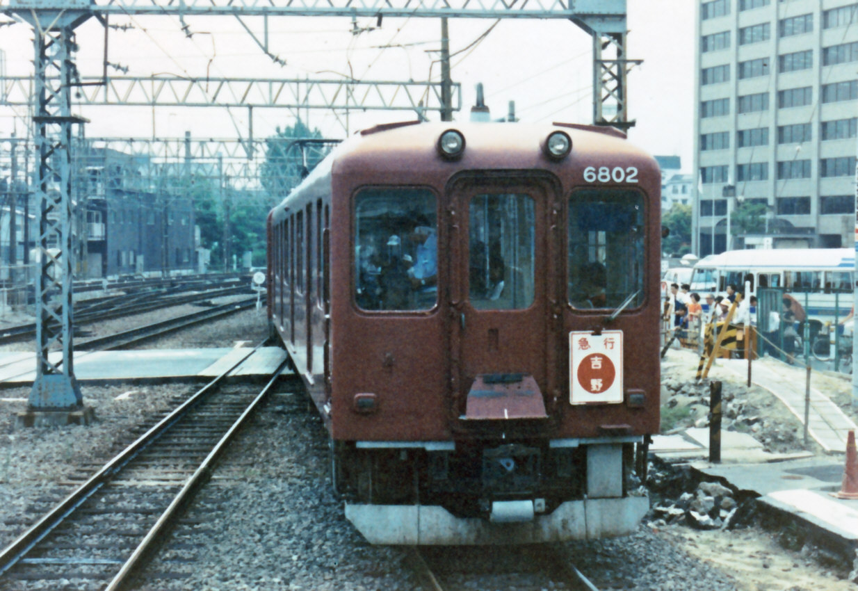 近鉄南大阪線６８００系「ラビットカー」 初期車はヘッドライト間隔が狭い